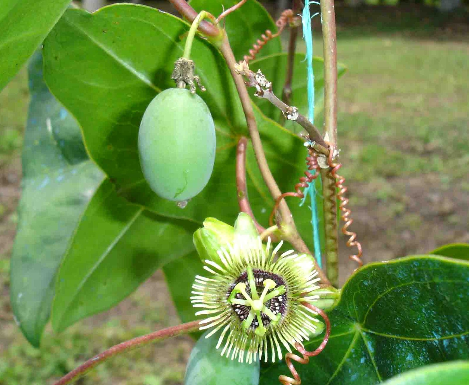 Passiflora coriaceae Juss. (Subgénero Decaloba). Especie de clima cálido desde el nivel del mar hasta los 1.300 m en los Andes. El Colombia es llamada murcielago por la forma de sus hojas.